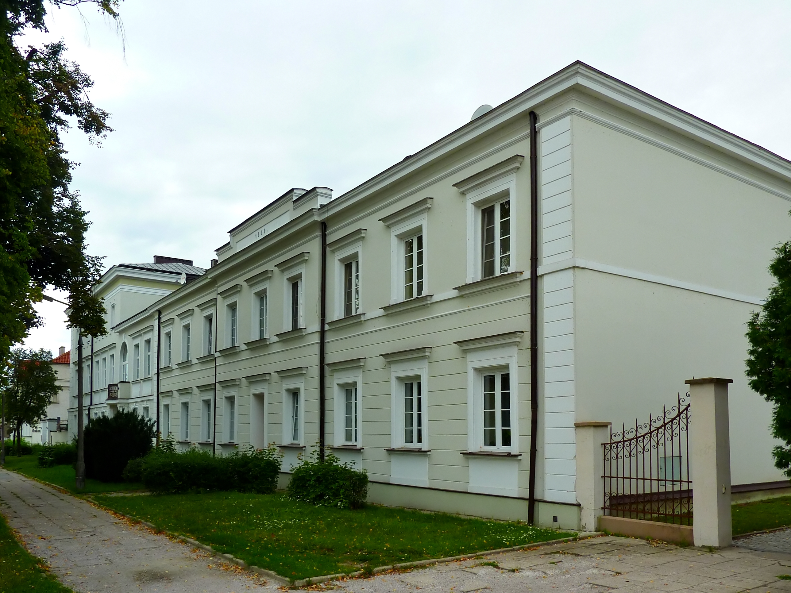 Płock, ul. Nowowiejskiego 2 - Wyższe Seminarium Duchowne (budynek I) w zespole klasztornym reformatów (zabytek nr 609 z 15.05.1989)